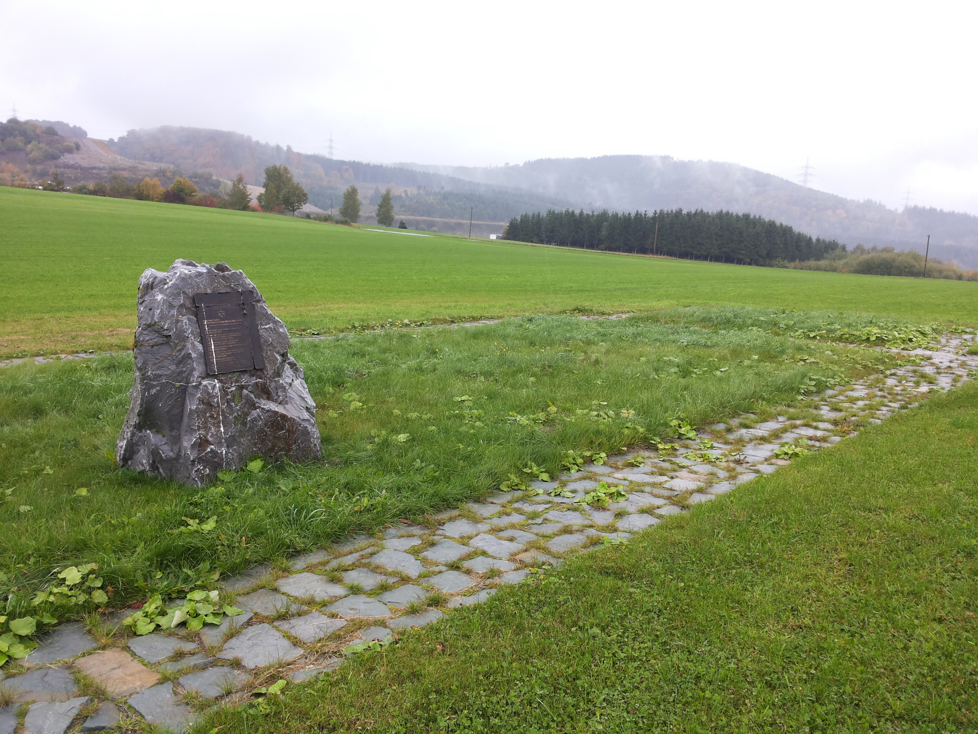 Standort mit Gedenkstein Kirche Sankt Quirinus bei Brilon-Rösenbeck (Germany)